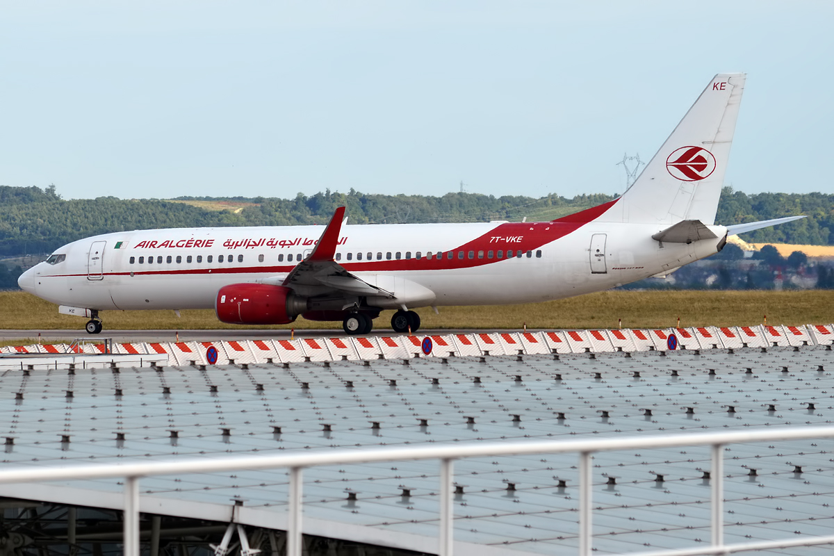 Air Algerie, 7T-VKE, Boeing 737-8D6